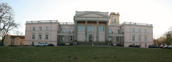 Pałac w Miłosławiu, fasada frontowa.